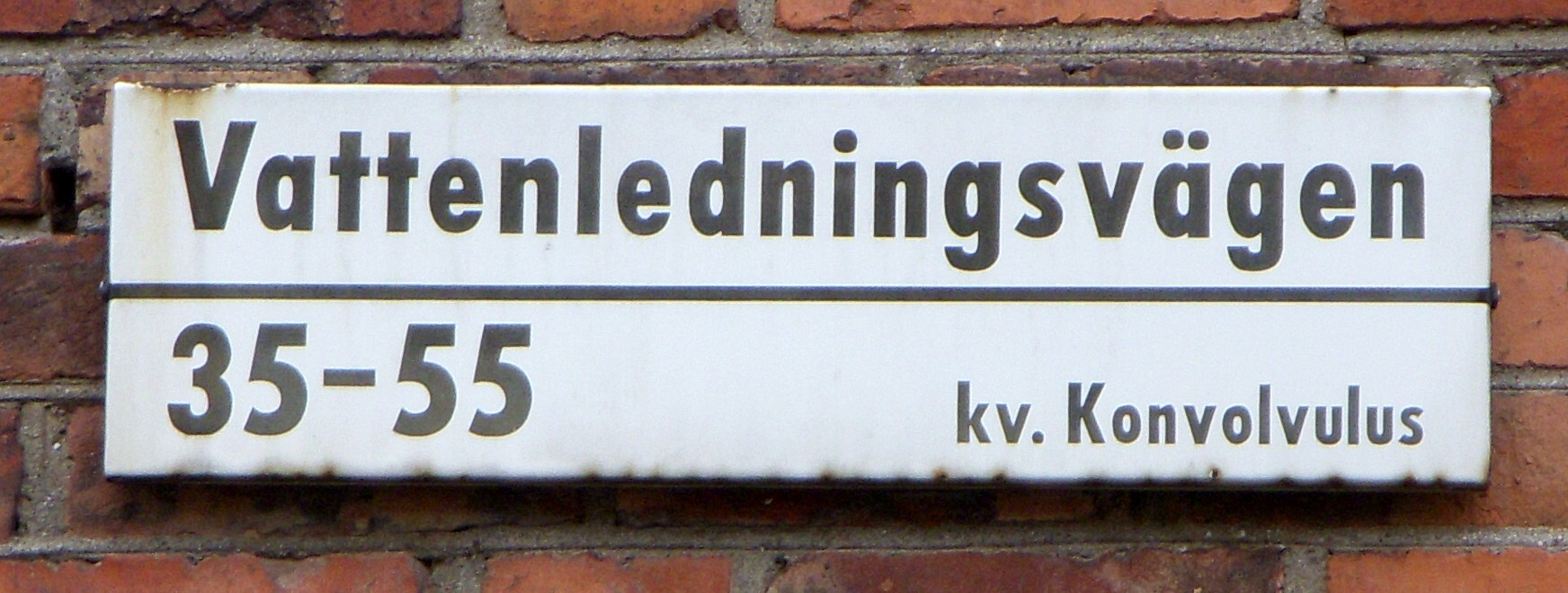 Gatuskylt i kvarteret Konvolvulus, Midsommarkransen, Stockholm.